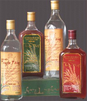 chai rượu nếp than